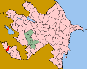 Map of Azerbaijan showing Kangarli (Kəngərli) rayon.